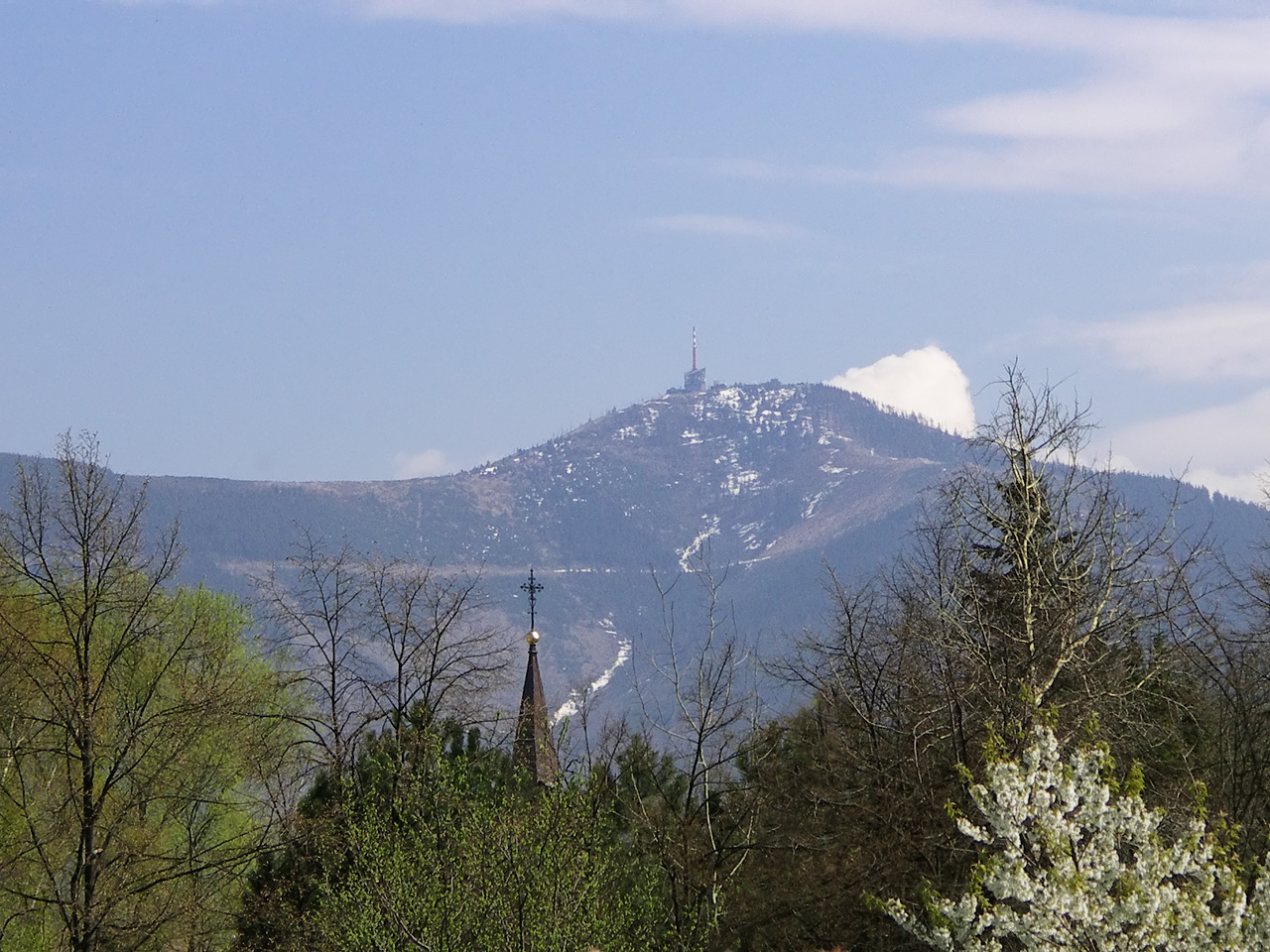 View at Lysá hora from Frýdlant nad Ostravicí